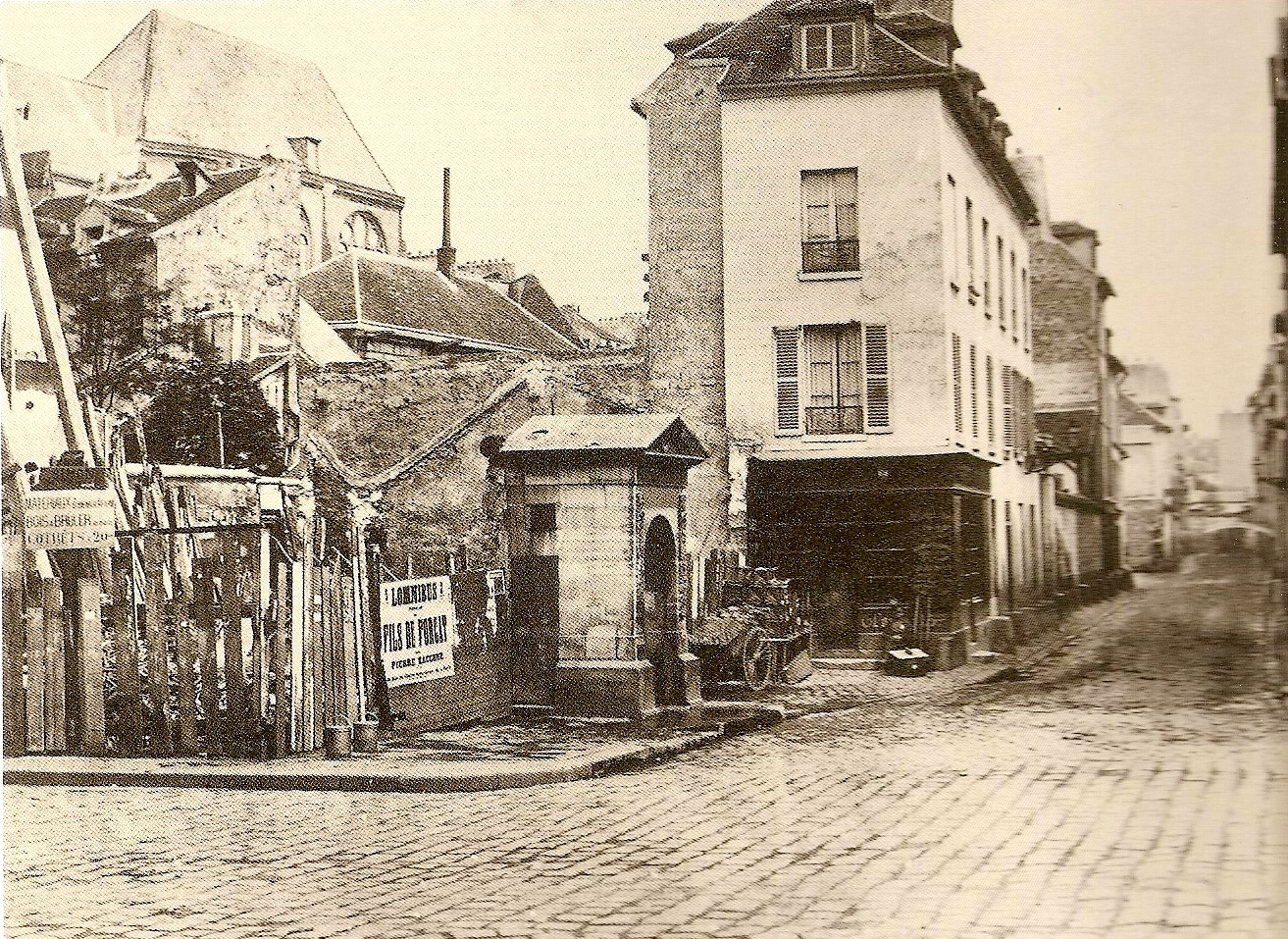 La fontaine Censier en 1865, rue Censier, vue de la rue Mouffetard (Paris 5e arrond.). Photographie de Charles Marville. Original conservé à la Bibliothèque administrative de Paris.